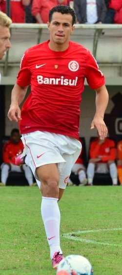 Leandro Damião em ação pelo Inter em 2013